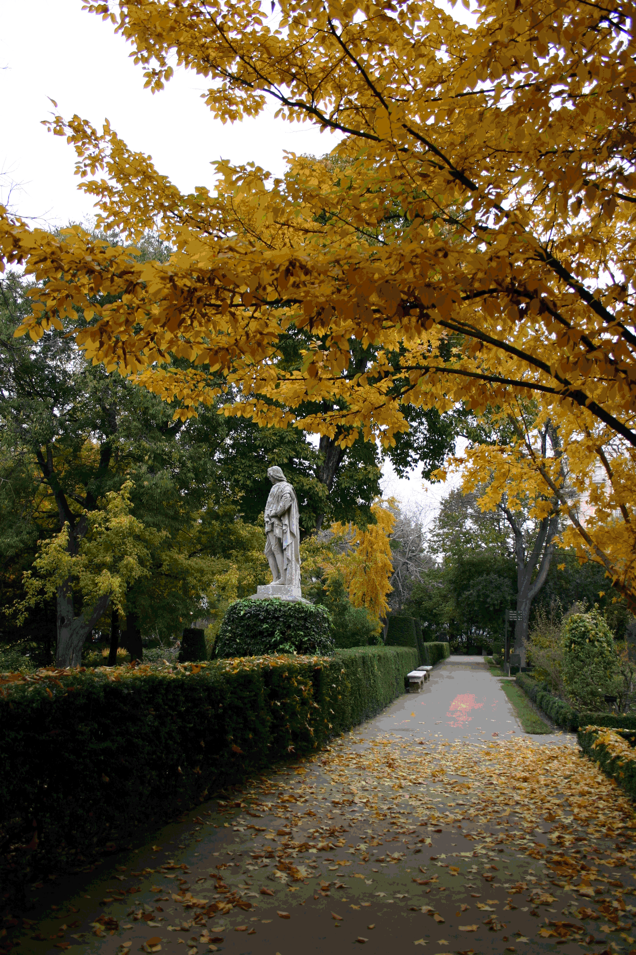 Paseo de las estatuas del Real Jardín Botánico de Madrid.